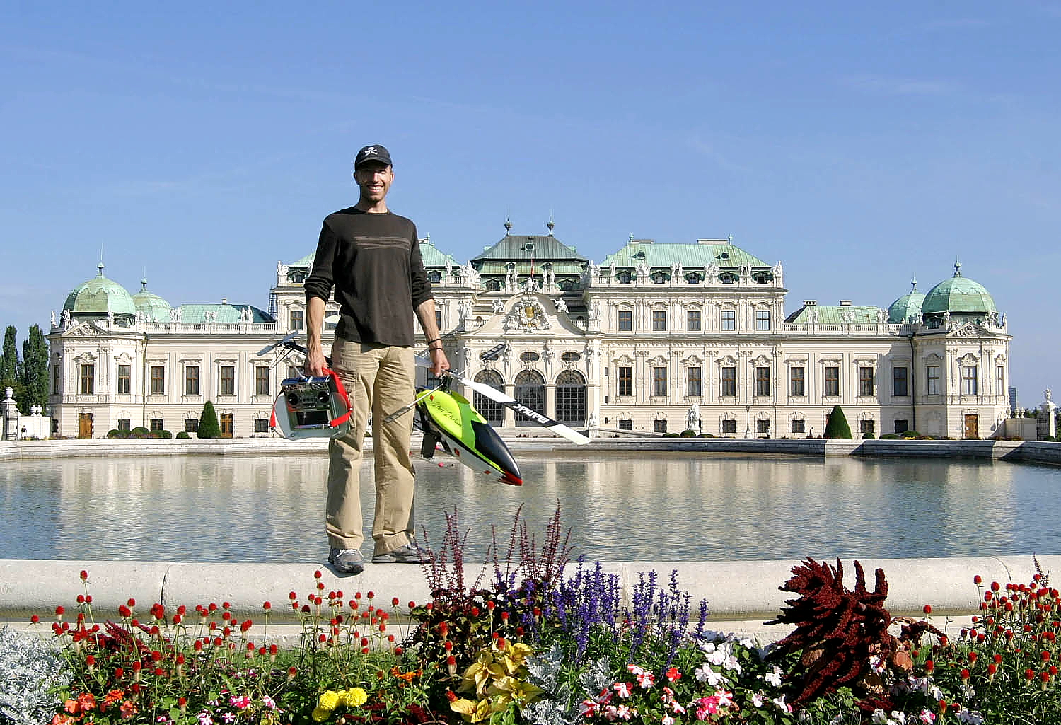 World Scenic Flights in Austria - World Scenic Flights-Pilot Tobias U. Wagner vor dem Schloss Belvedere in Wien